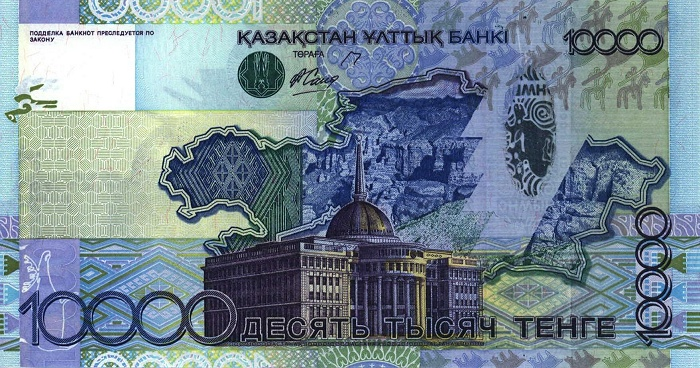 Банкнота достоинством в 10 000 тенге образца 2006 года. Казахстан. Реверс.